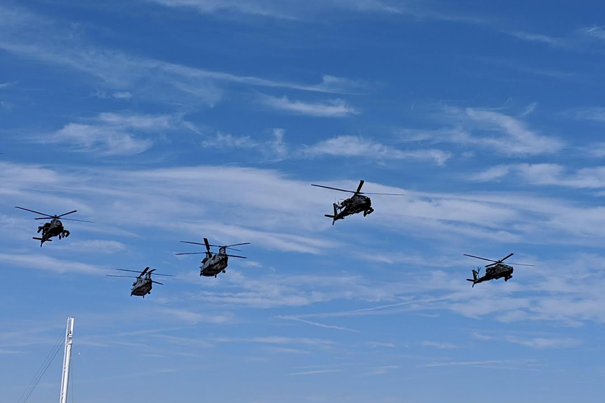 Nederlandse helikopters, 3 Apaches en 2 Chinooks, voerden vandaag in pijlformatie een fly-by uit over de pitstraat van het Circuit Of The Americas (COTA) in Austin. Dat gebeurde direct na het spelen van het Amerikaanse volkslied en voor het begin van de Formule 1 Grand Prix.